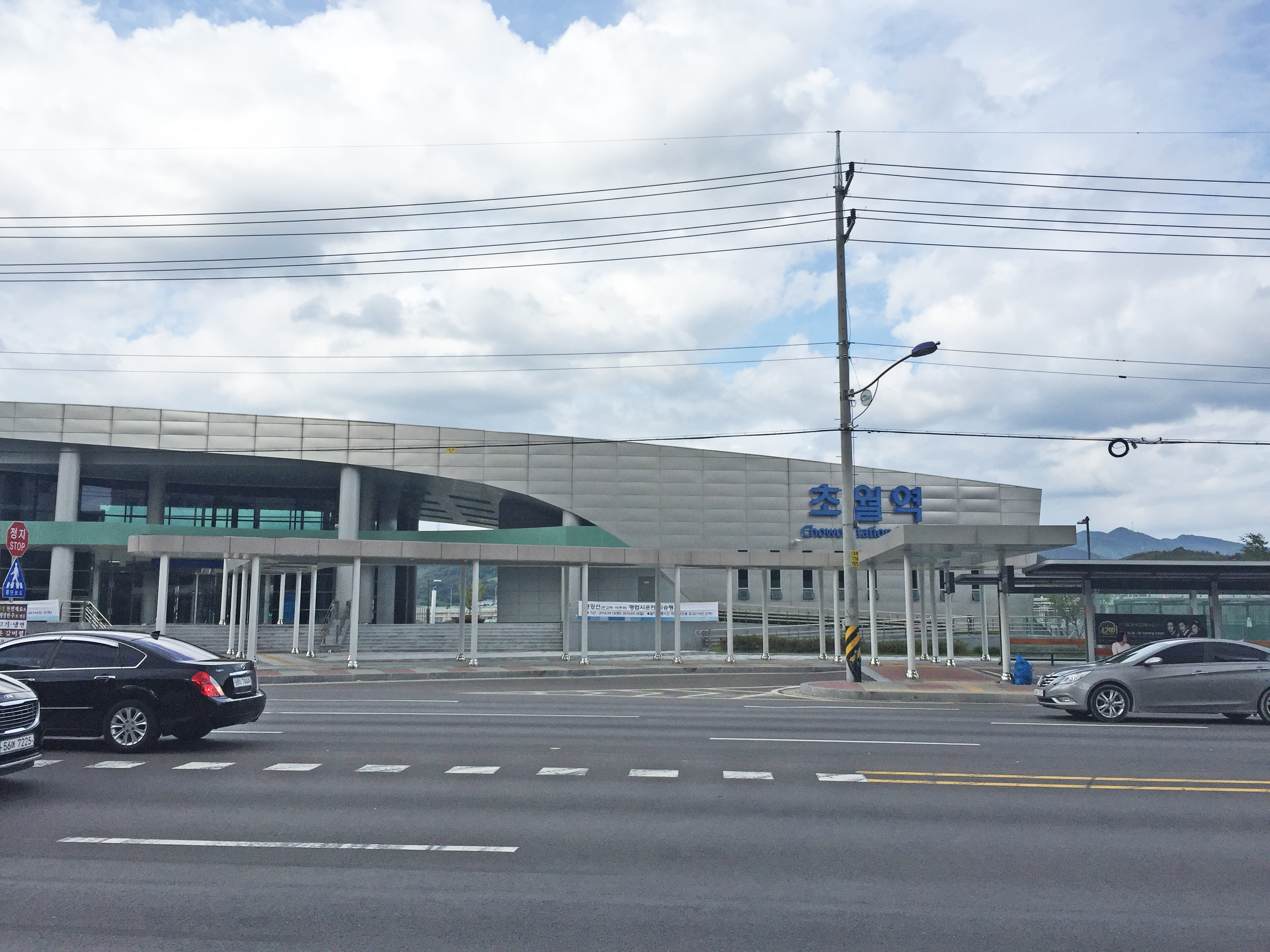 초월역 외관입니다.